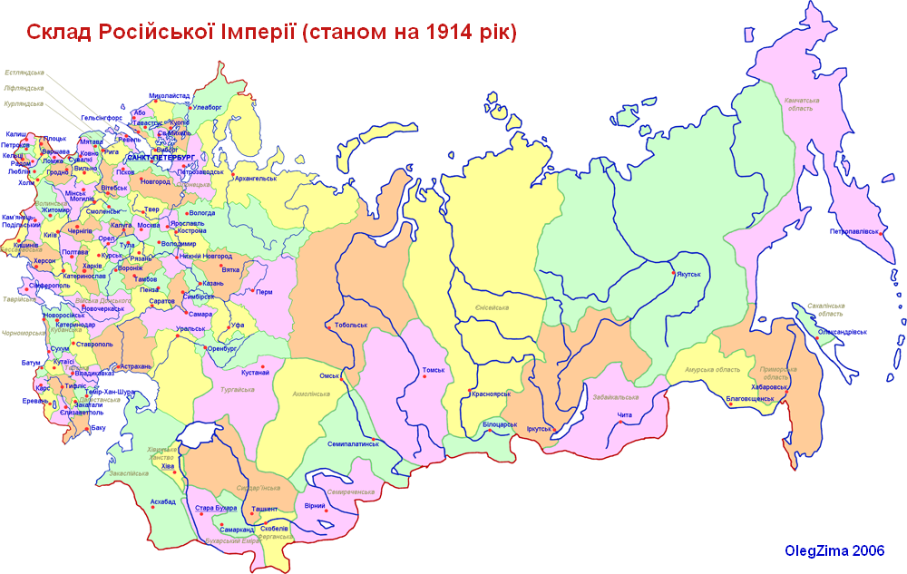 map